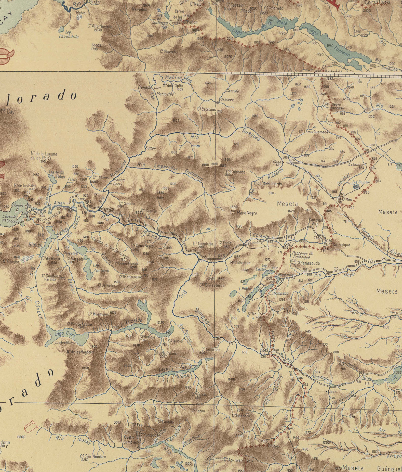 Cuenca del río Aysén en un compuesto de dos mapas de L. Risopatrón.